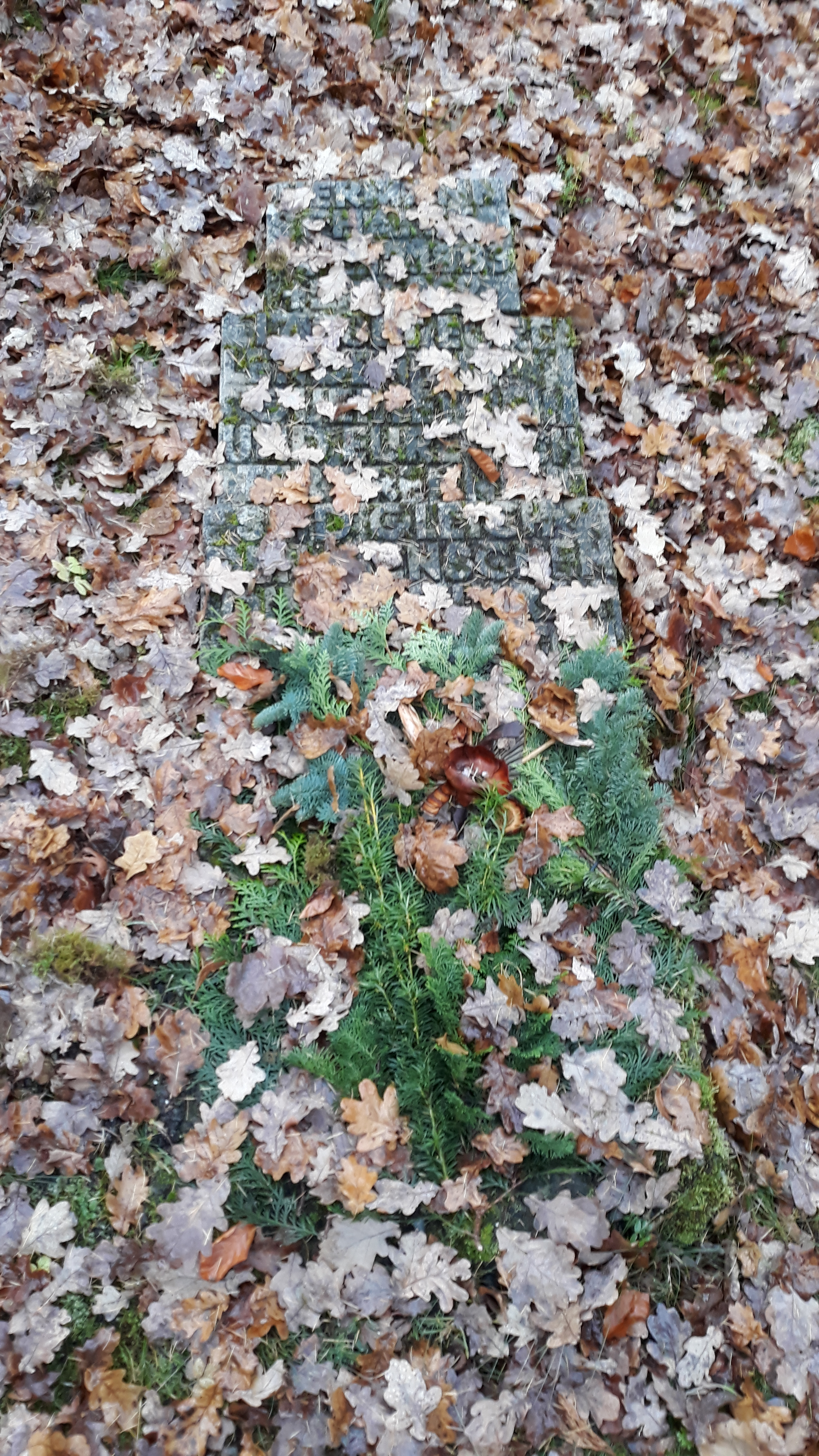 Das Grab des deutschen evangelischen Theologen und Sozialpädagogen Hermann Schafft auf dem Friedhof Mulang in Kassel. Die stark verwitterte Inschrift ist Lukas 12, 35-36: "Lasset eure Lenden umgürtet sein und eure Lichter brennen und seid gleich den Menschen, die auf ihren Herrn warten."